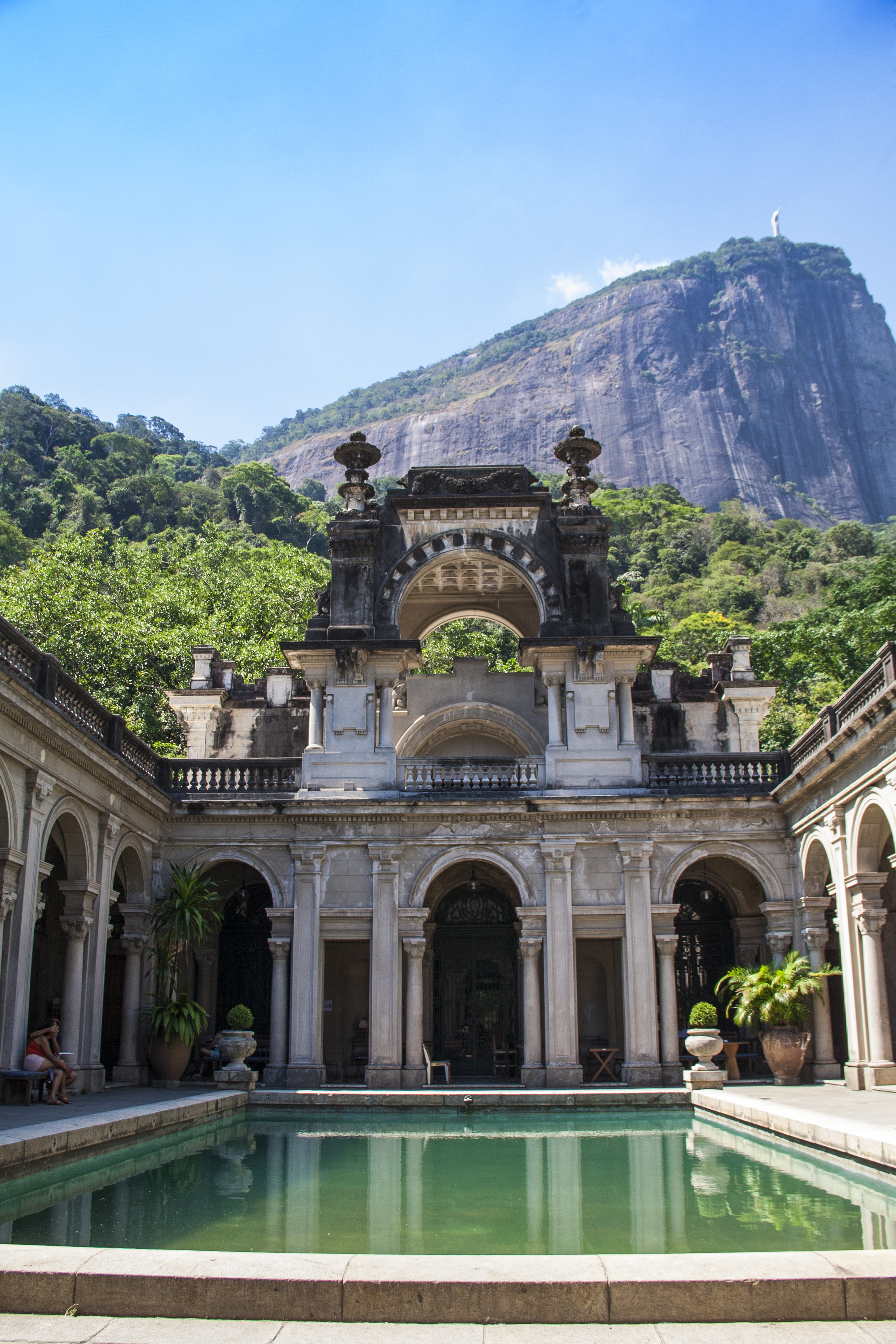 Parque Henrique Lage (Conjunto Paisagístico)